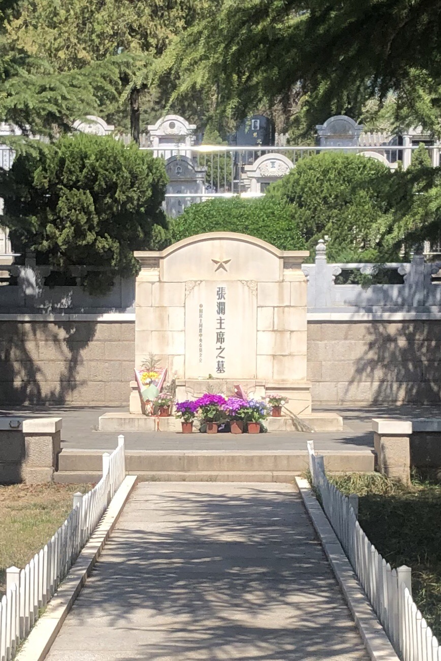 张澜墓。位于北京八宝山革命公墓内。张本人生前曾任中华人民共和国中央人民政府副主席，1930-1940年代民主政治运动人士。中国民主同盟主席。